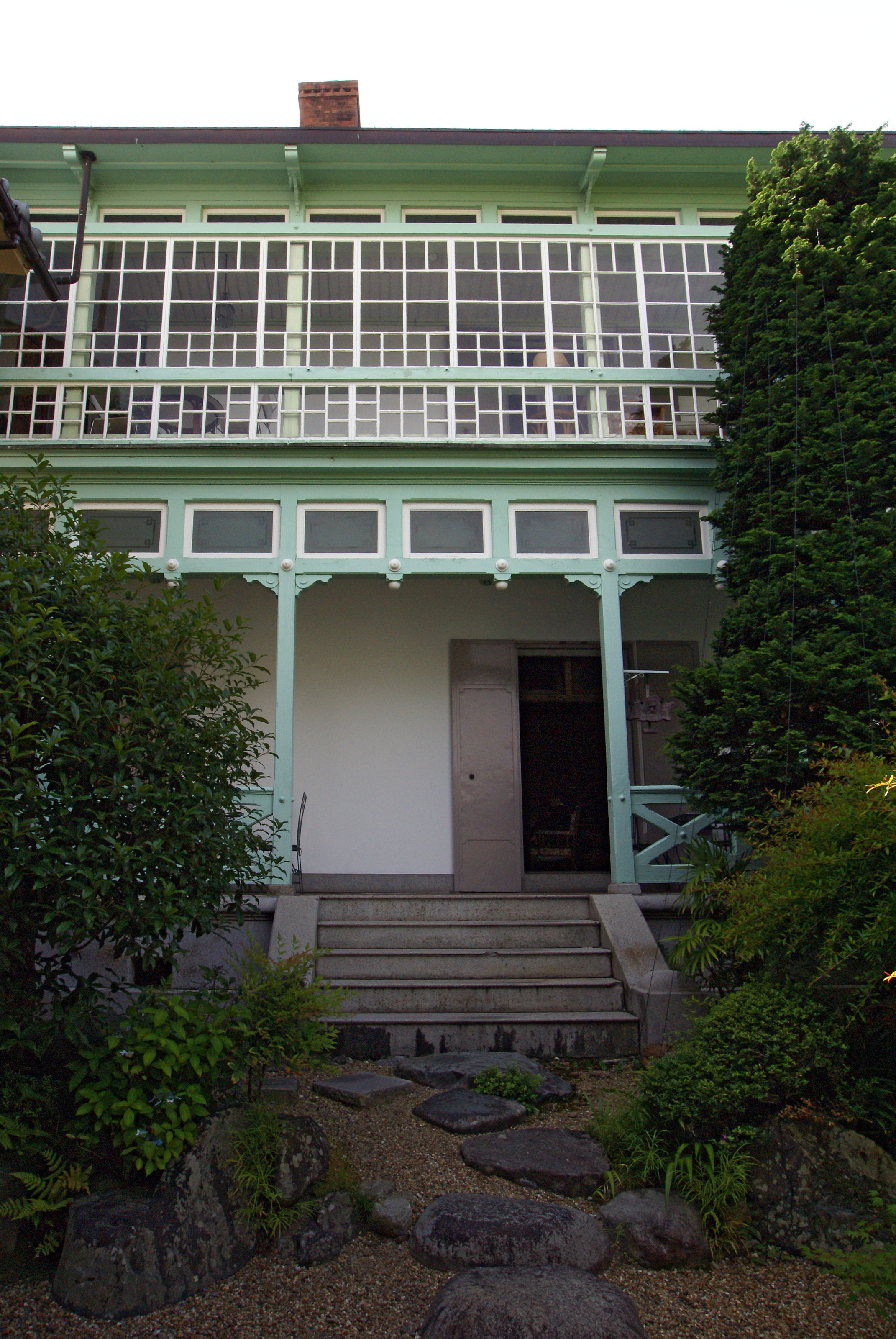 Rakurakuso in Kameoka, Kyoto prefecture, Japan